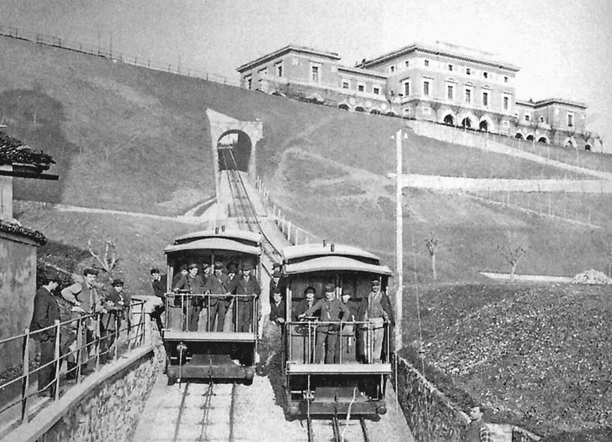 Standseilbahn Lugano kurz nach Eröffnung